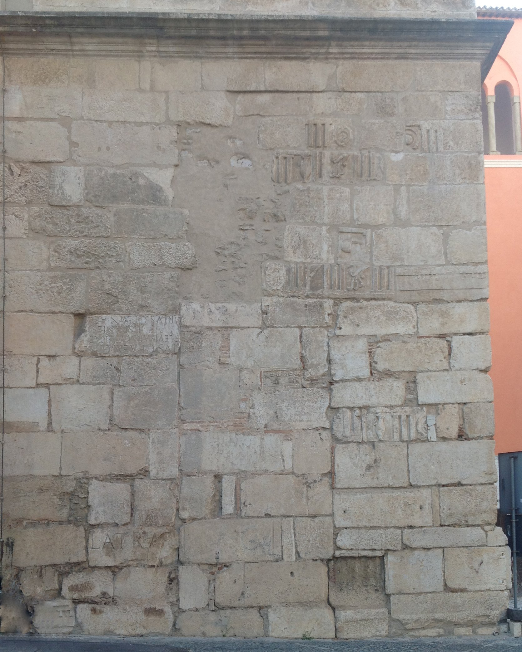 Fiancata sinistra del basamento del campanile della cattedrale di Gaeta, realizzata con elementi di spoglio.